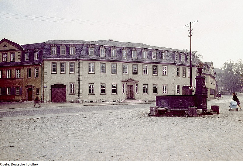 Original image description from the Deutsche Fotothek Weimar. Goethes Wohnhaus am Frauenplan